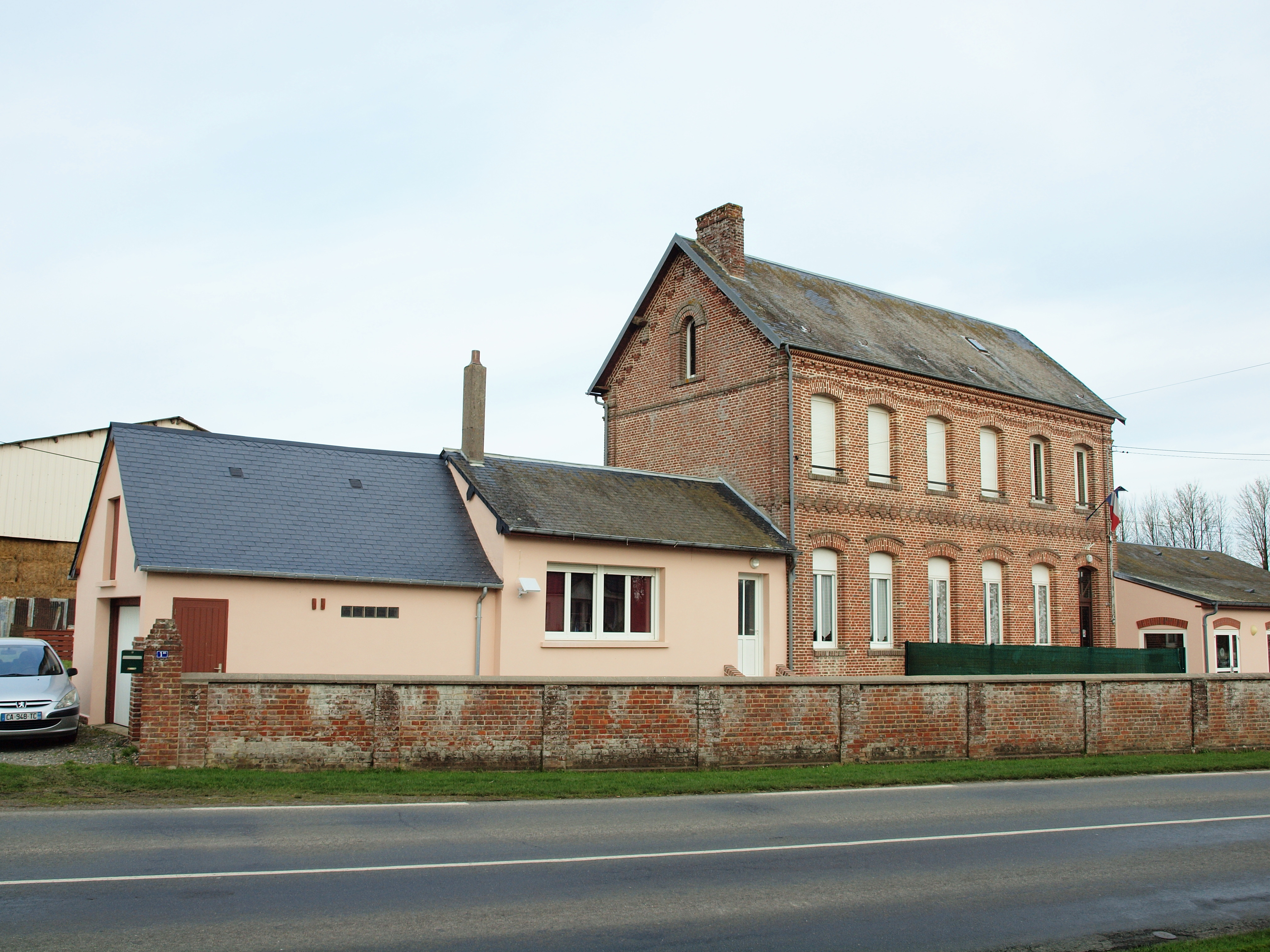 Monceaux-l'Abbaye (Oise, France)